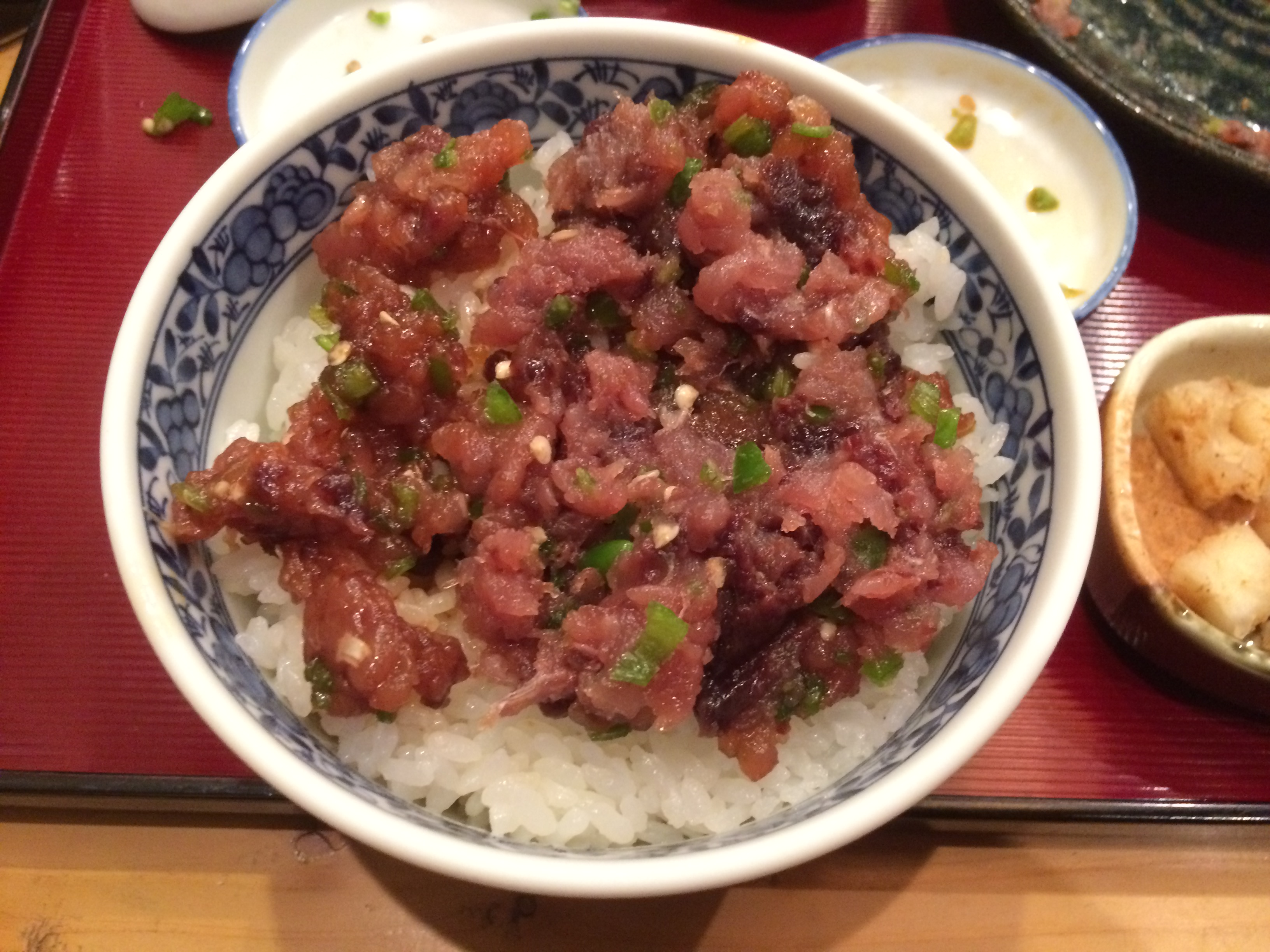 カツオの仲間・ソウダガツオの新鮮な身をたたきにし、青唐辛子のみじん切り、丼に盛り付けたご飯とともに食べる郷土料理「うずわめし」。 写真は「うずわのたたき」を青唐辛子と和え、丼のご飯に盛り付けたもの。 静岡県伊東市ではソウダガツオを「うずわ」という地方名で呼ぶ。 伊東市の海鮮居酒屋・海鮮料理店「伊豆鮮魚商 まるたか」にて。